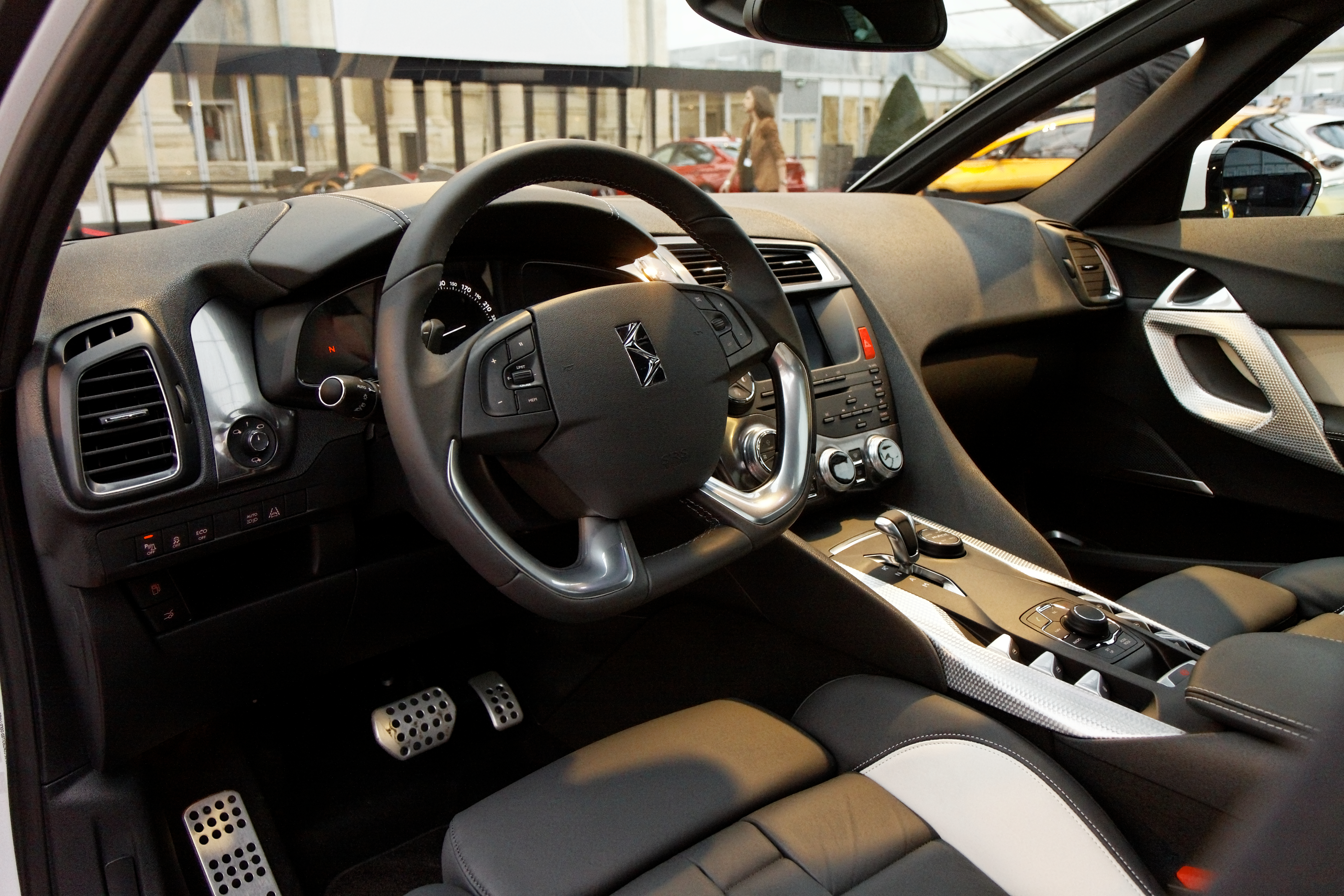 Citroën DS5